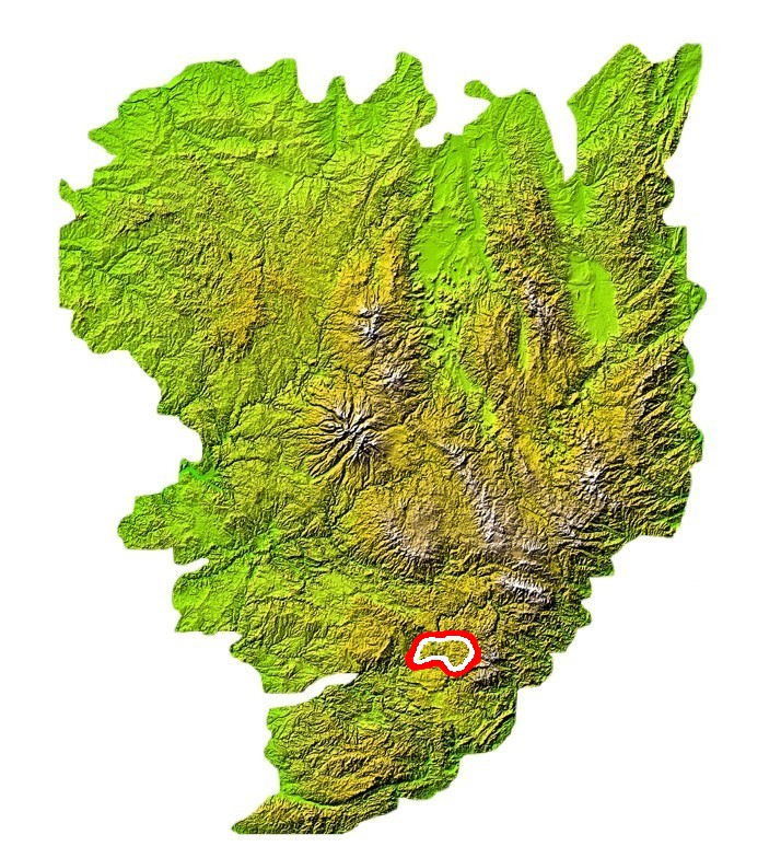 Localisation du causse noir sur la carte du Massif central